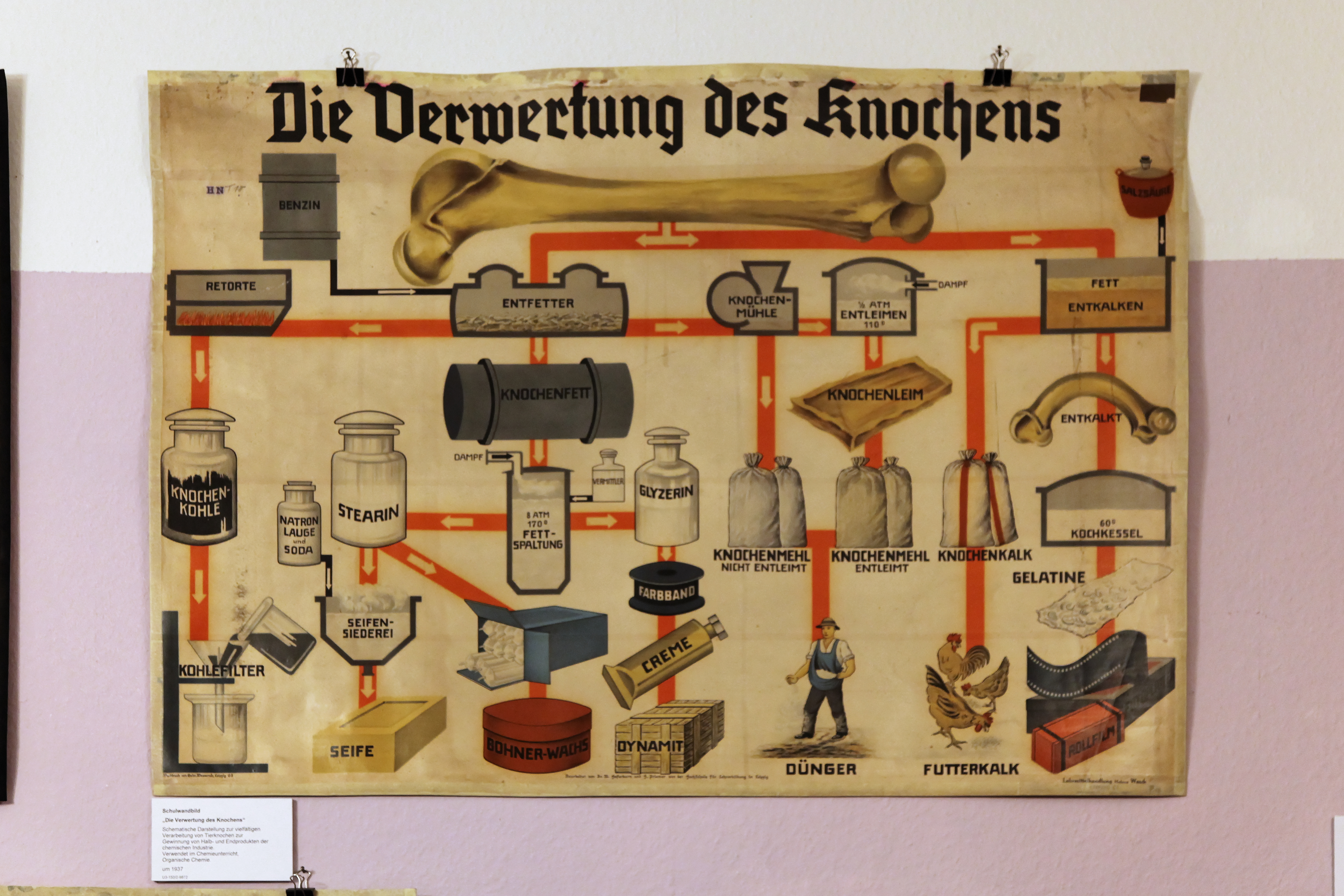 Schulwandbild "Die Verwertung des Knochens" (um 1937), Schematische Darstellung zur vielfältigen Verarbeitung von Tierknochen zur Gewinnung von Halb- und Endprodukten der chemischen Industrie, Verwendet im Chemieunterricht, Organische Chemie, Schulmuseum, Goerdelerring in Leipzig